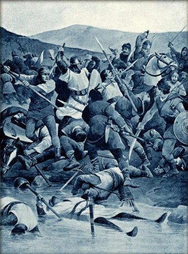 Věnceslav Černý - Bitva u Trutiny (poblíž Smiřic, řeka Trotina je pravostranný přítok Labe